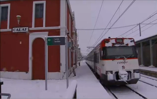 L'estació de tren de Calaf el 4 de febrer de 2015, després d'una nevada.